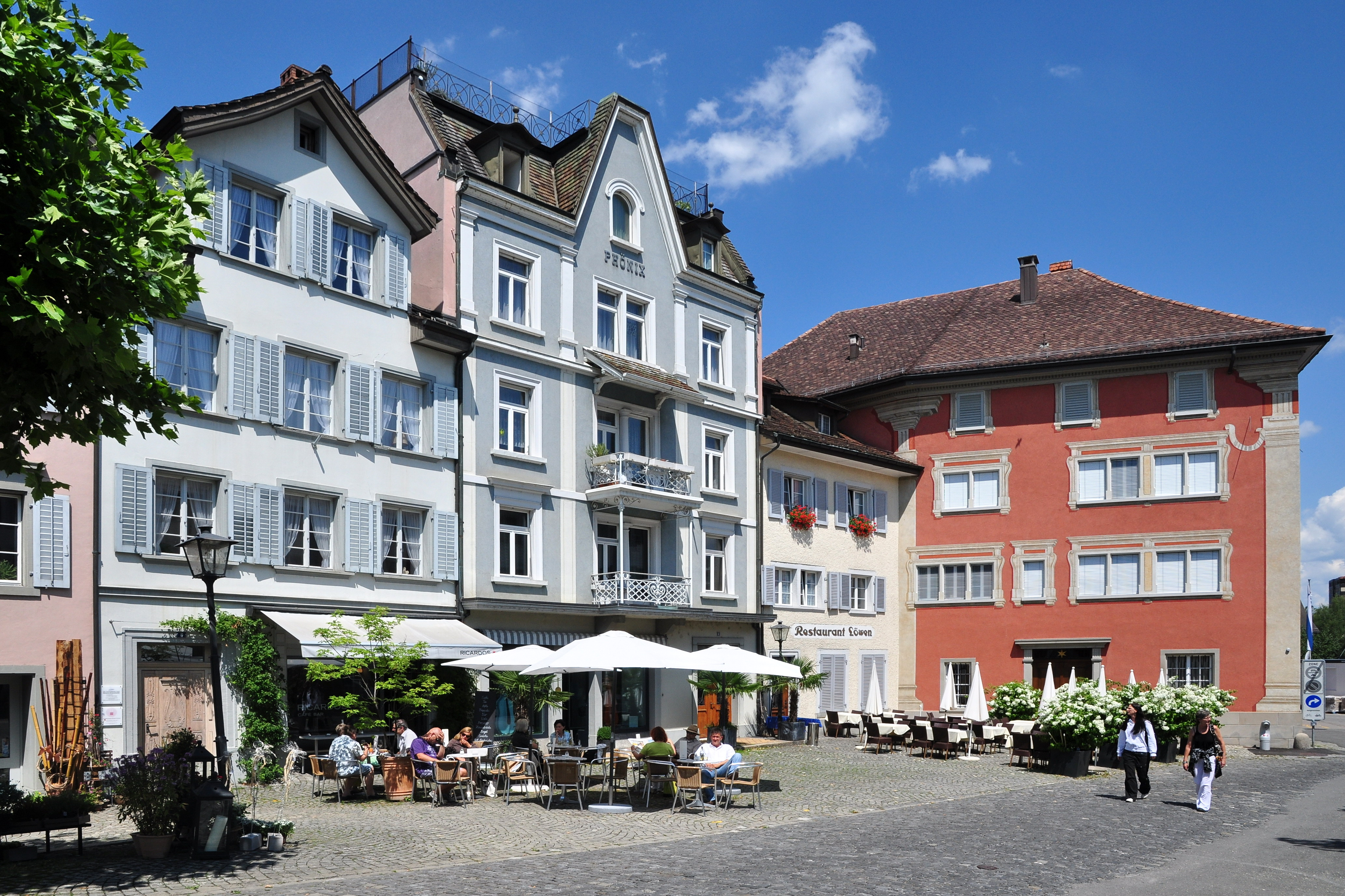 Haus zum Alten Sternen, Engelplatz in Rapperswil (Switzerland)